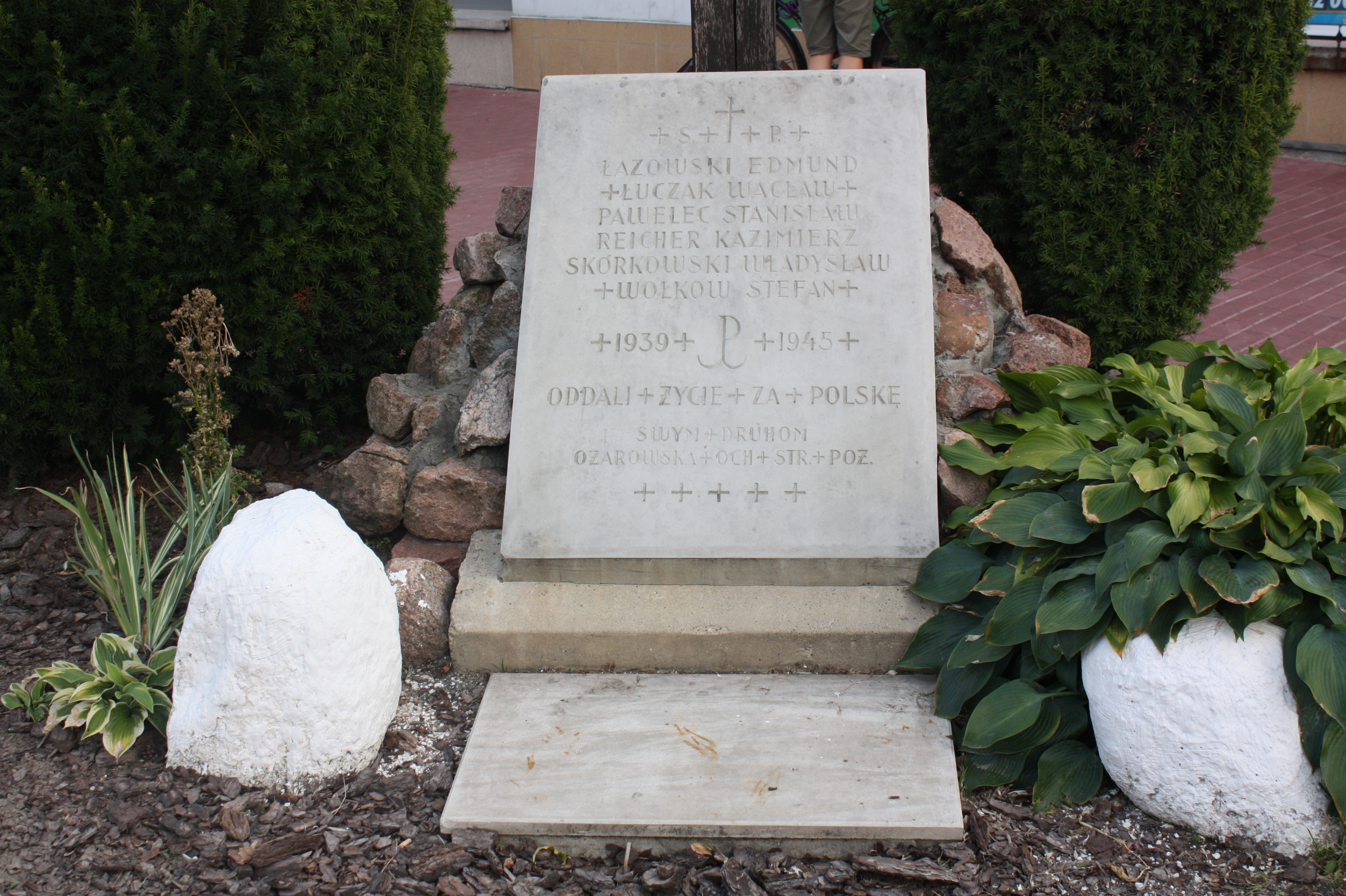 Tablica ku czci rozstrzelanych w Palmirach strażaków z OSP Ożarów Mazowiecki